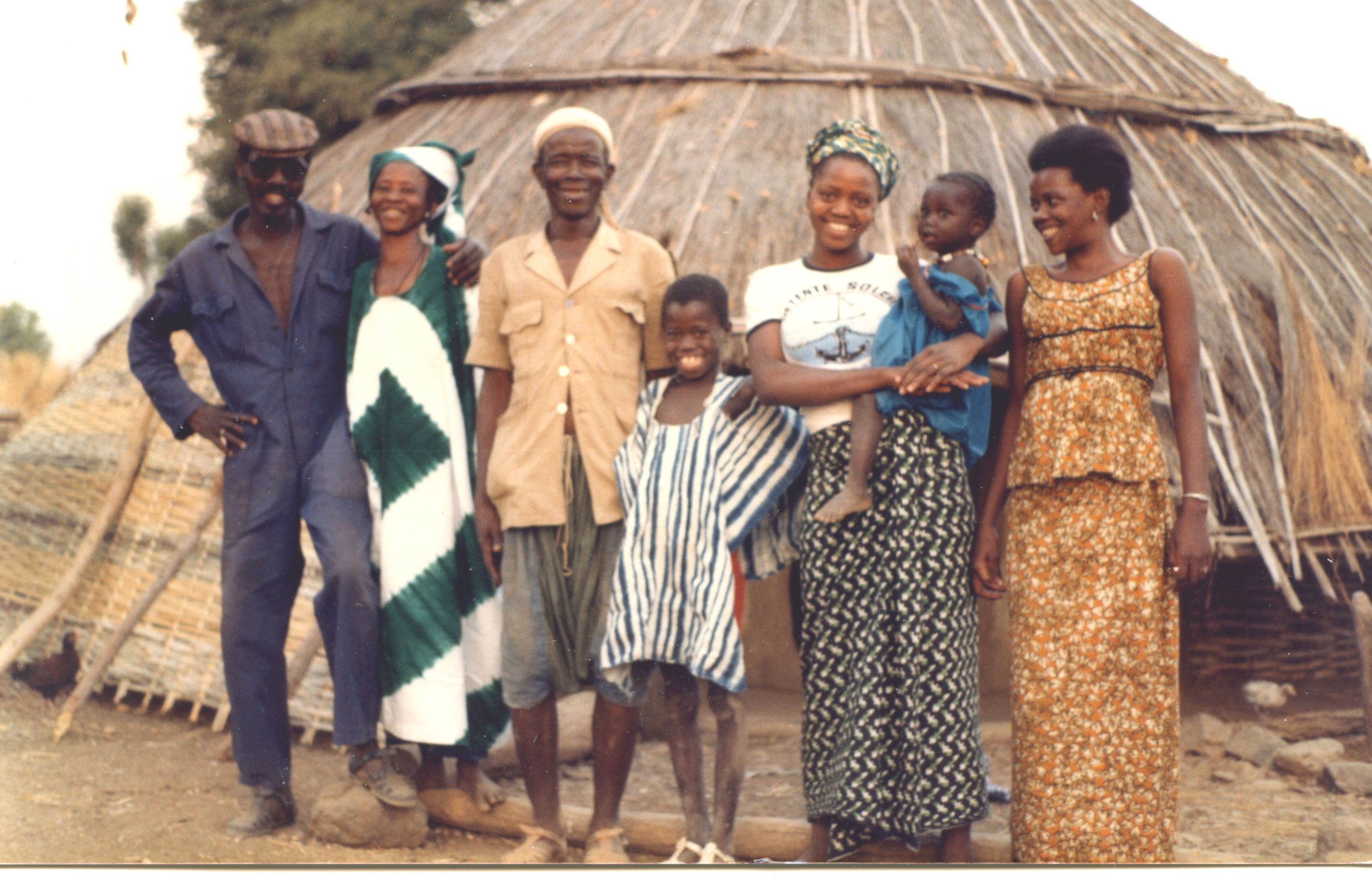 Lots of smiles from very nice people, Diallo compound, Ibel, Senegal (légèrement retouchée pour améliorer les contrastes)